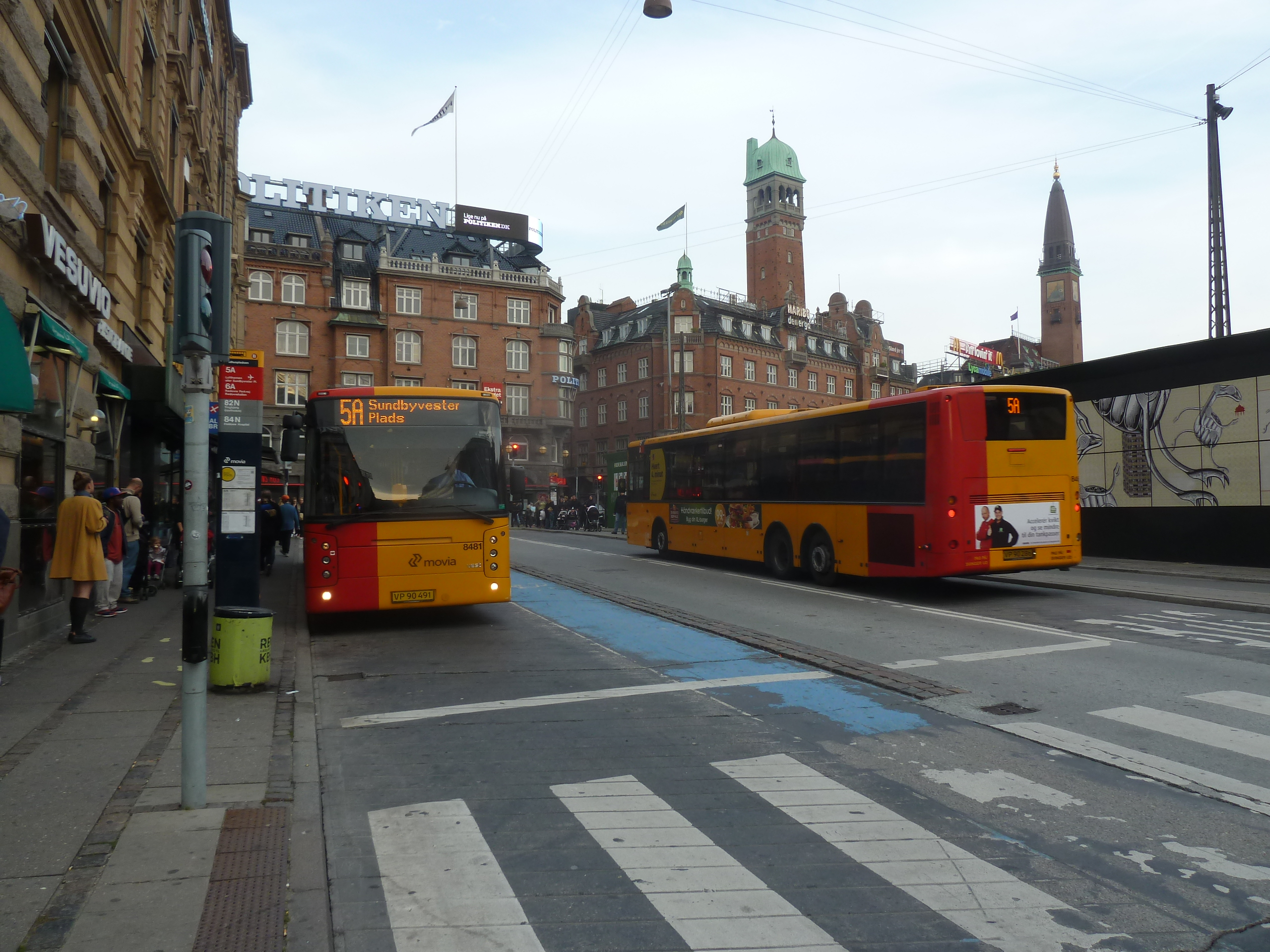 Movia bus line 5A on Rådhuspladsen in Copenhagen.